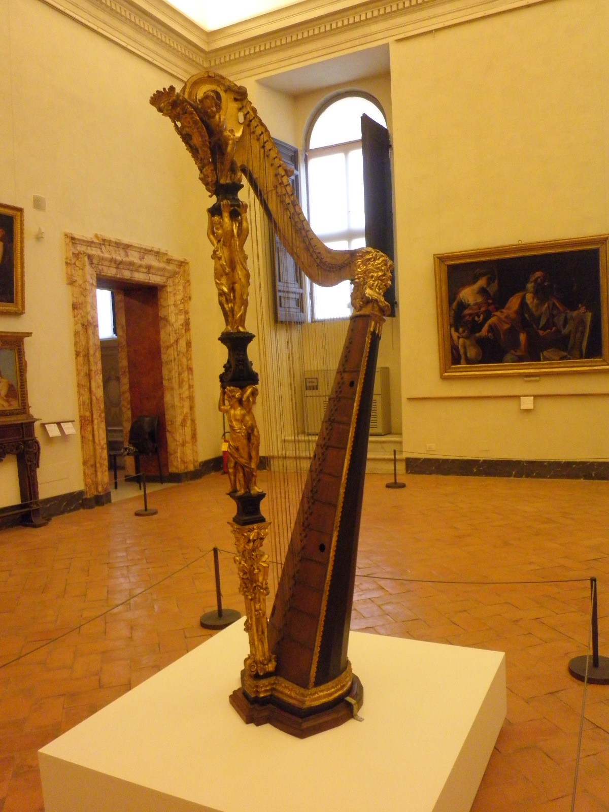 Roma, palazzo Barberini: arpa c.d. Barberini temporaneamente esposta al piano nobile della Galleria. Si tratta dello strumento che compare nella tela di Lanfranco Venere che suona l'arpa, esposta nella stessa sala.